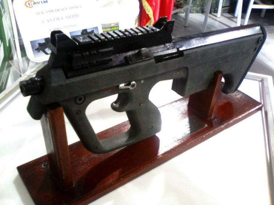 Subfusil Bullpup en Fase de Pruebas